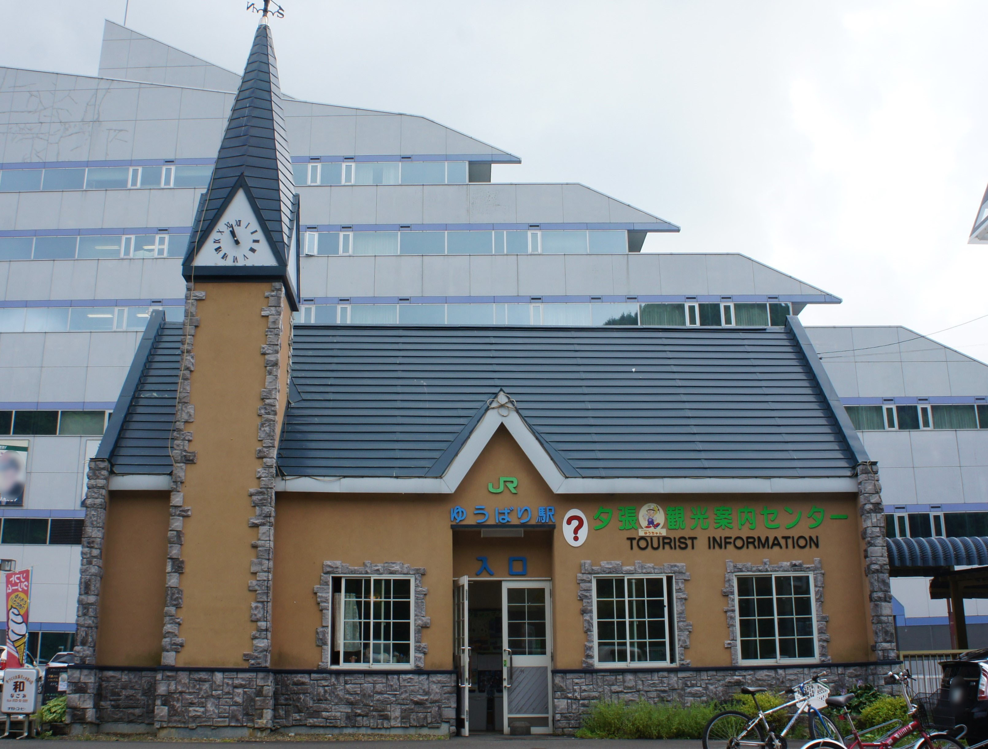 JR石勝線・夕張駅の駅舎